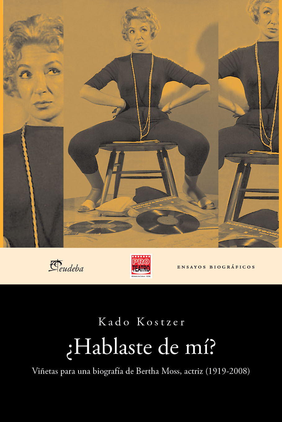 Una joven actriz que mide 1,80 m y calza 43 ¿será elegida como protagonista romántica del próximo film? ¿Podrá despertar el deseo del galán de turno? ¿Servirá de modelo a las adolescentes? En la década del cuarenta y en un medio donde otro era el estereotipo reinante, ¡imposible! A los “inconvenientes” de la estatura y de los pies, Bertha Moss sumaba el de su apéndice nasal. A pesar de su gran talento y personalidad magnética, desde el inicio de su carrera directores y productores la condenaron a ser “vieja”, la pérfida madrastra, la celadora inflexible, la despótica matriarca o la solterona resentida en ficciones donde fue soporte de otras actrices que, a la vez, tuvieron que “soportarla” a ella. Decidida a hacer borrón y cuenta nueva, en 1959 se fue a México, donde sería primera actriz, rejuvenecería a los 40 años y de fea pasaría a ser linda. Alienada por el “fuego sagrado” del arte, sus cómicos exabruptos la hicieron legendaria. Encontraría su nicho como la más famosa villana de los culebrones de la TV azteca.Sus grandezas escénicas y su lado menos diáfano –y hasta ridículo– están expuestos en este libro en el marco de grandes ciudades, reflejando hábitos y costumbres de cada época. También su entorno: una hermana víctima de amoríos peligrosos, una sobrina autista, un marido nominal y decenas de compañeros que invariablemente “la envidiaban”, “le hacían brujerías” y “complotaban” para opacar su talento. Primero en Buenos Aires y luego en México, Bertha luchó por el estrellato y estuvo ligada social o artísticamente a Fernando Vallejo, María Félix, Tita Merello, Salvador Novo, Mirtha Legrand, Marilyn Monroe, Cantinflas, Enrique Muiño, Silvana Pampanini, Luis Sandrini, Katy Jurado, Libertad Lamarque y Luis Buñuel, entre otros.